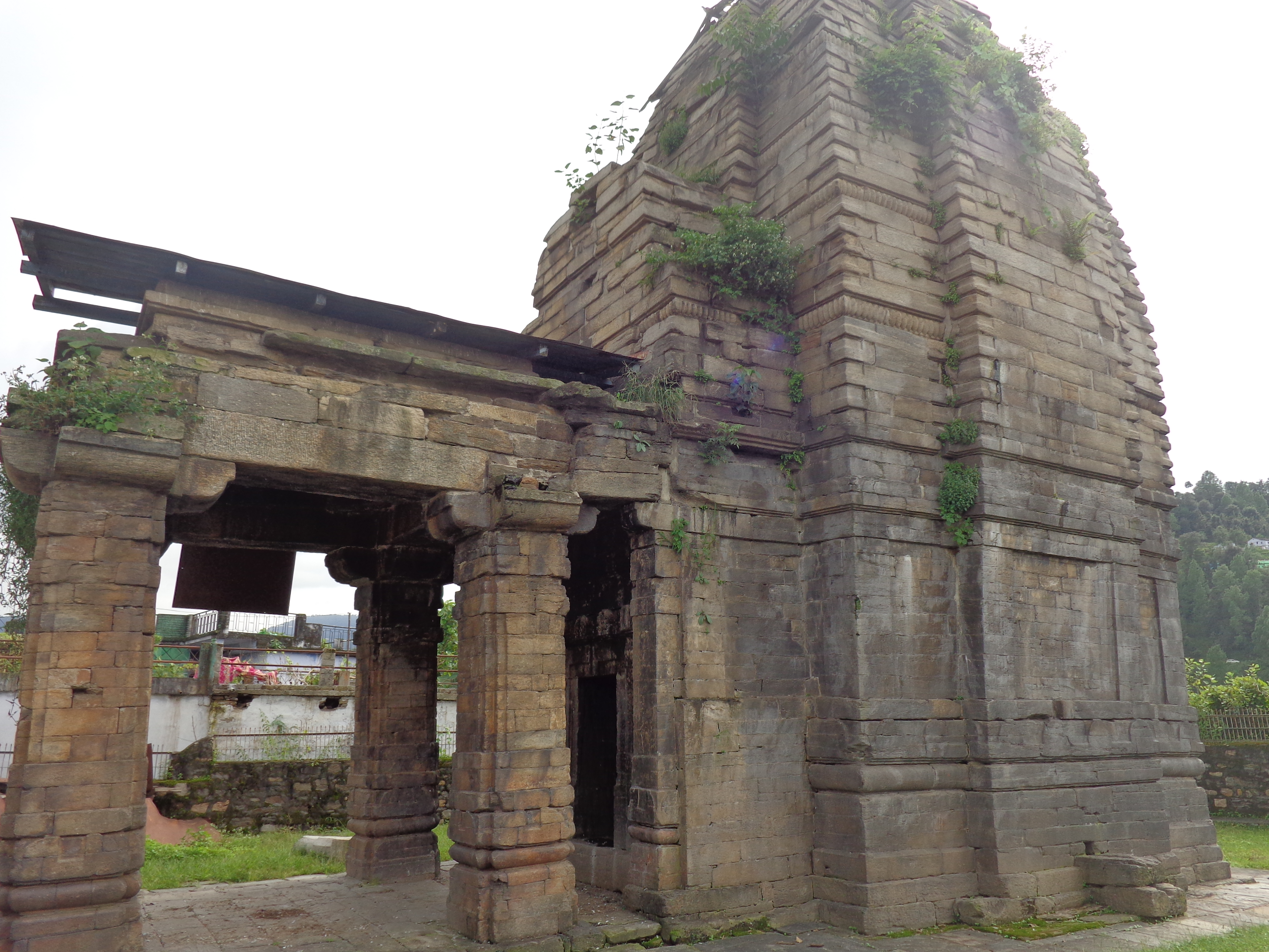 नेपाल भाषा: Kartikeya Dewara Ka Mandir